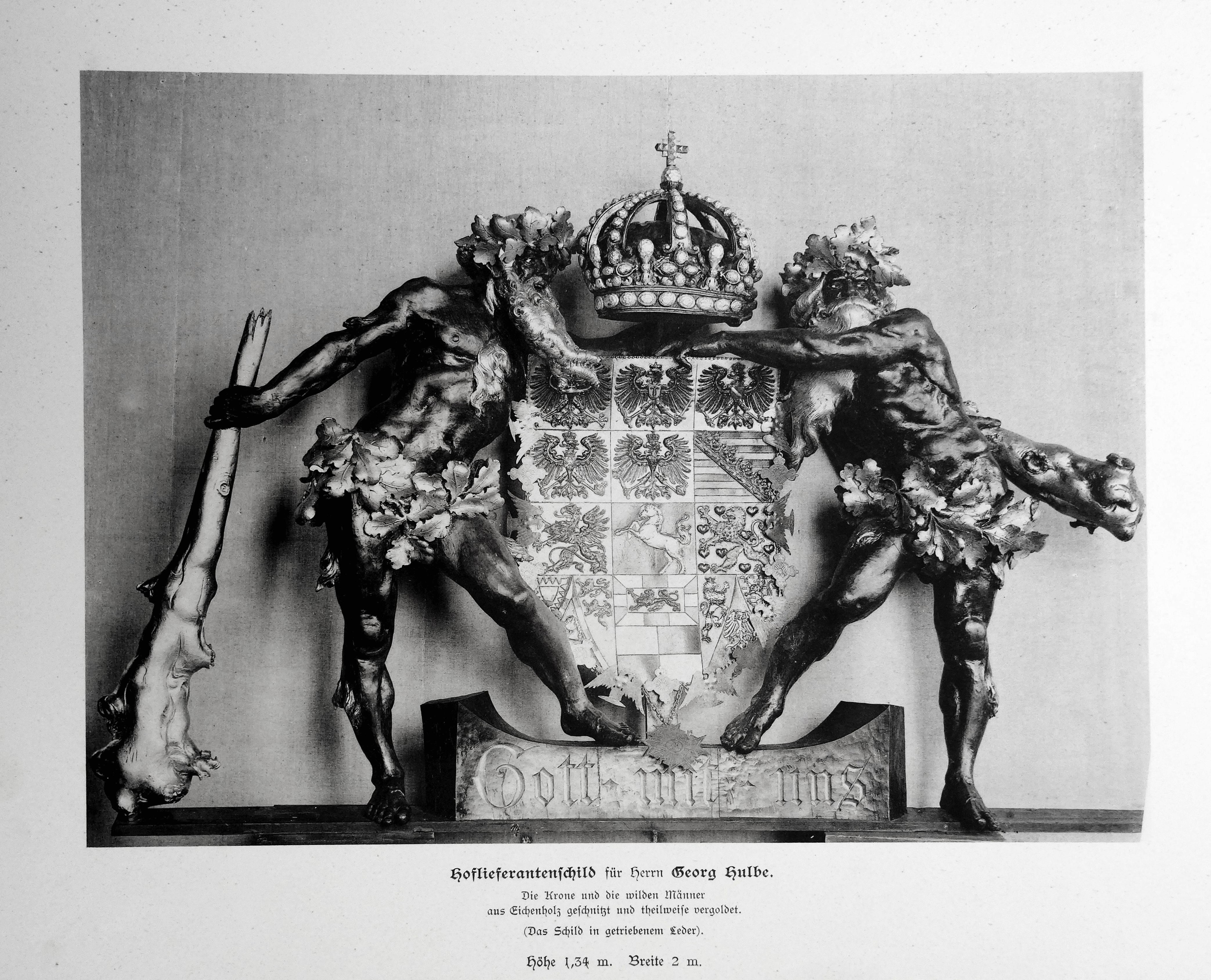 Aloys Denoth: Hoflieferantenschuld für Georg Hulbe: "Die Krone und die wilden Männer"- aus Eichenholz, tw. vergoldet, das Schild aus getriebenem Leder